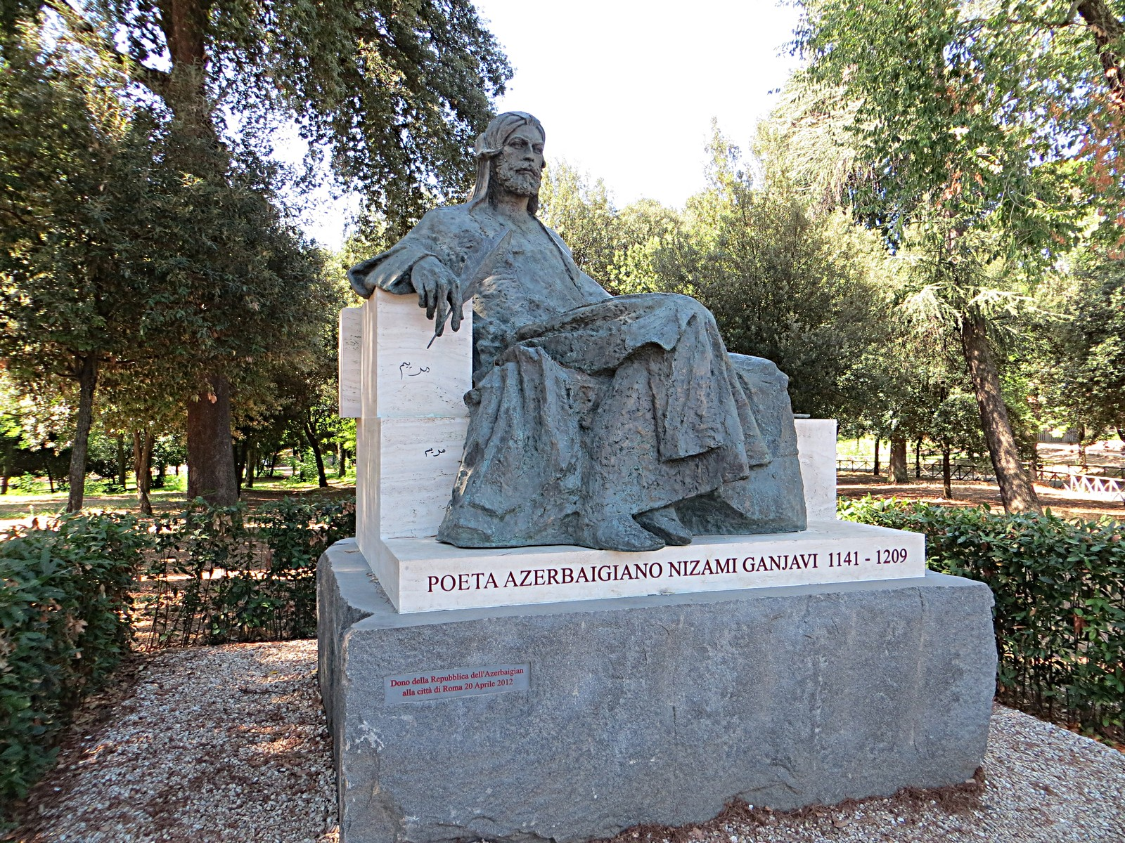 Villa Borghese - Monumento a Nizami Ganjavi